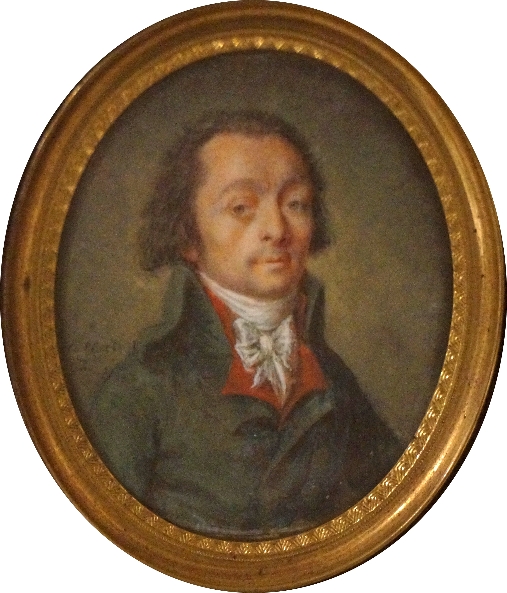 peinture de Marie le Carlier par Jean-François Gérard .